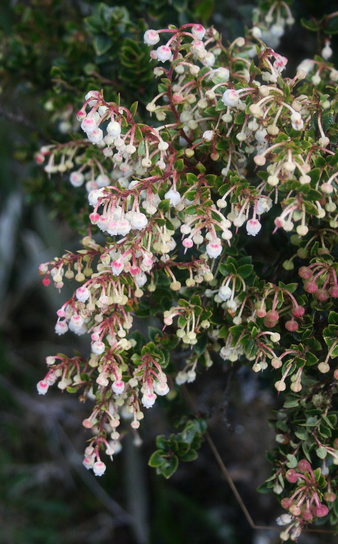 Gaultheria anastomosans, Heidekrautgewächse (Ericaceae) – Kolumbien/Colombia: Dpto. Cundinamarca, Parque Nacional Natural Chingaza, Sendero Lagunas de Siecha, ca. 11–12 km SSE Guasca, ca. 3450–3500 m